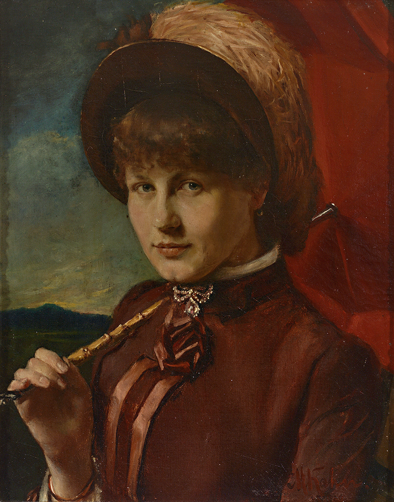 Portrait einer jungen Frau mit Hut und aufgespanntem Sonnenschirm. Öl auf Leinwand, 51,5 x 41 cm, signiert.